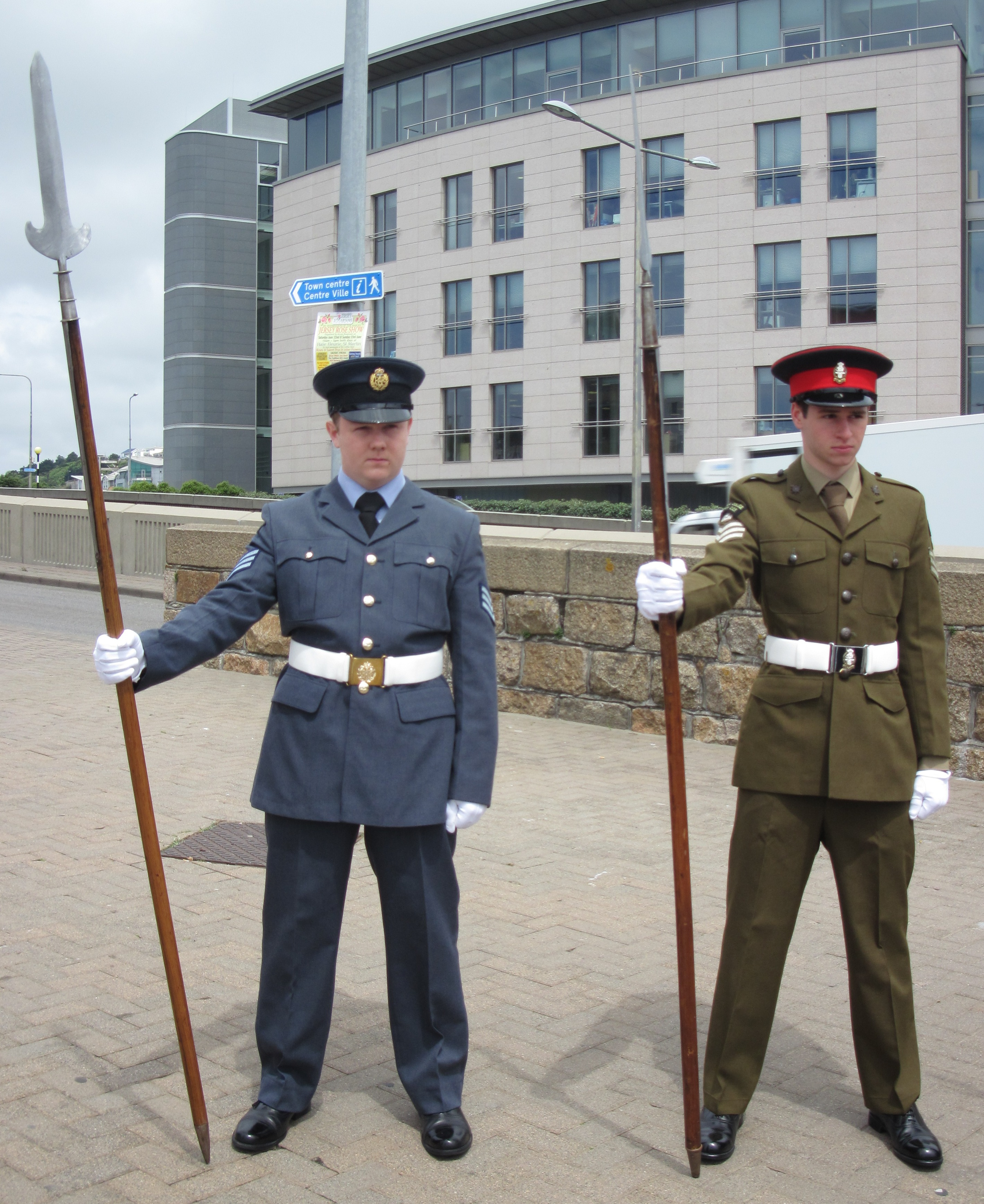 Commémoration de l'Appel du 18 Juin 1940 à Saint Hélier, Jersey, le 18 juin 2013: lecture du texte de l'appel par un collégien du Collège Victoria en présence du Consul de France à Jersey, du Connétable de Saint Hélier, du représentant du Lieutenant-Gouverneur de Jersey, d'anciens combattants, et de membres de la Gendarmerie maritime de France (du patrouilleur Géranium), au monument des Français Libres situé au port de Saint Hélier.